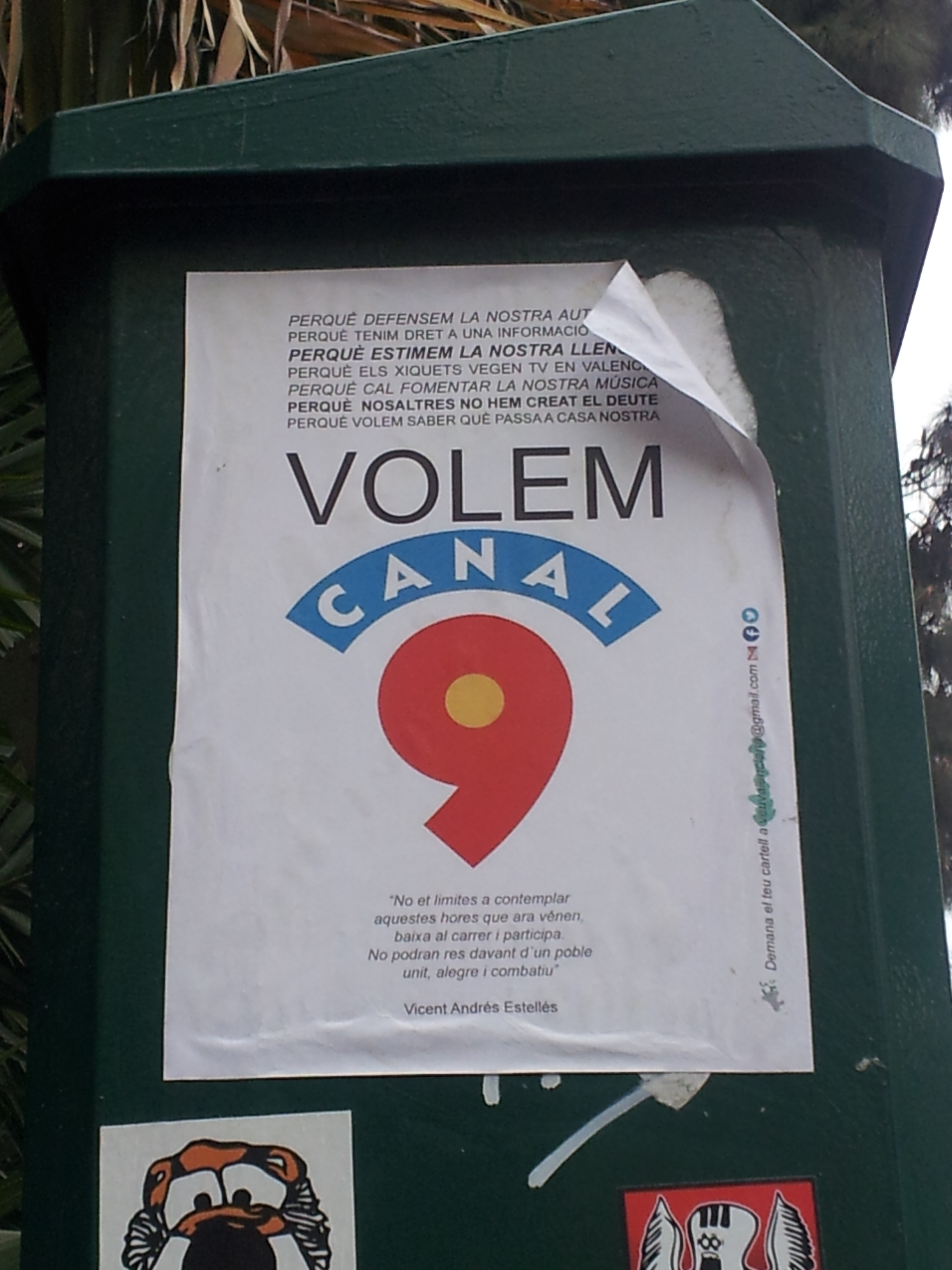 Cartell a Antic Regne.